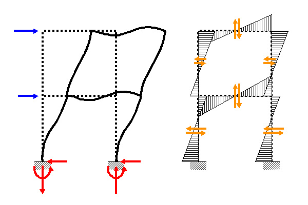 ラーメン構造 03